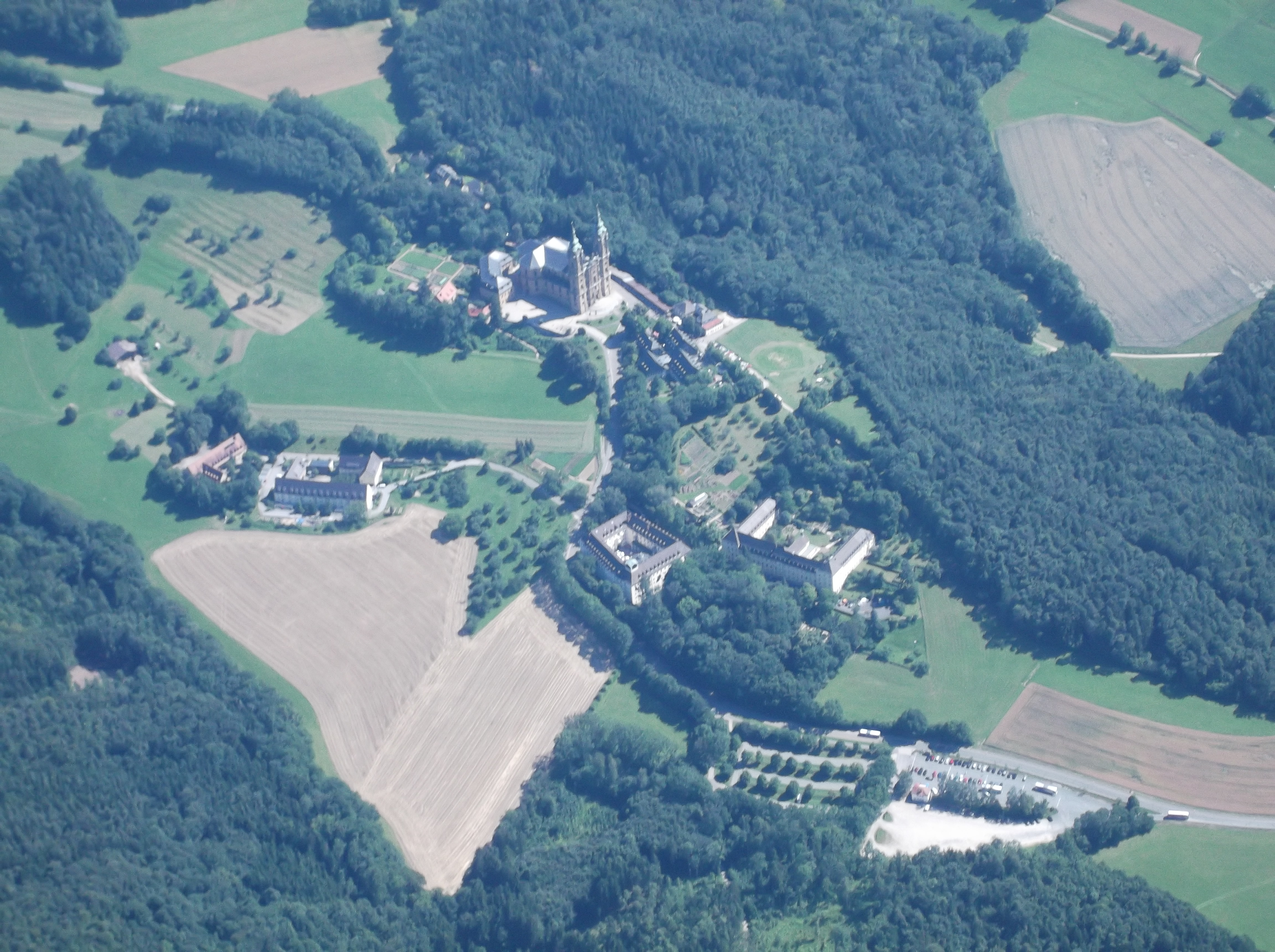 Luftbild Vierzehnheiligen